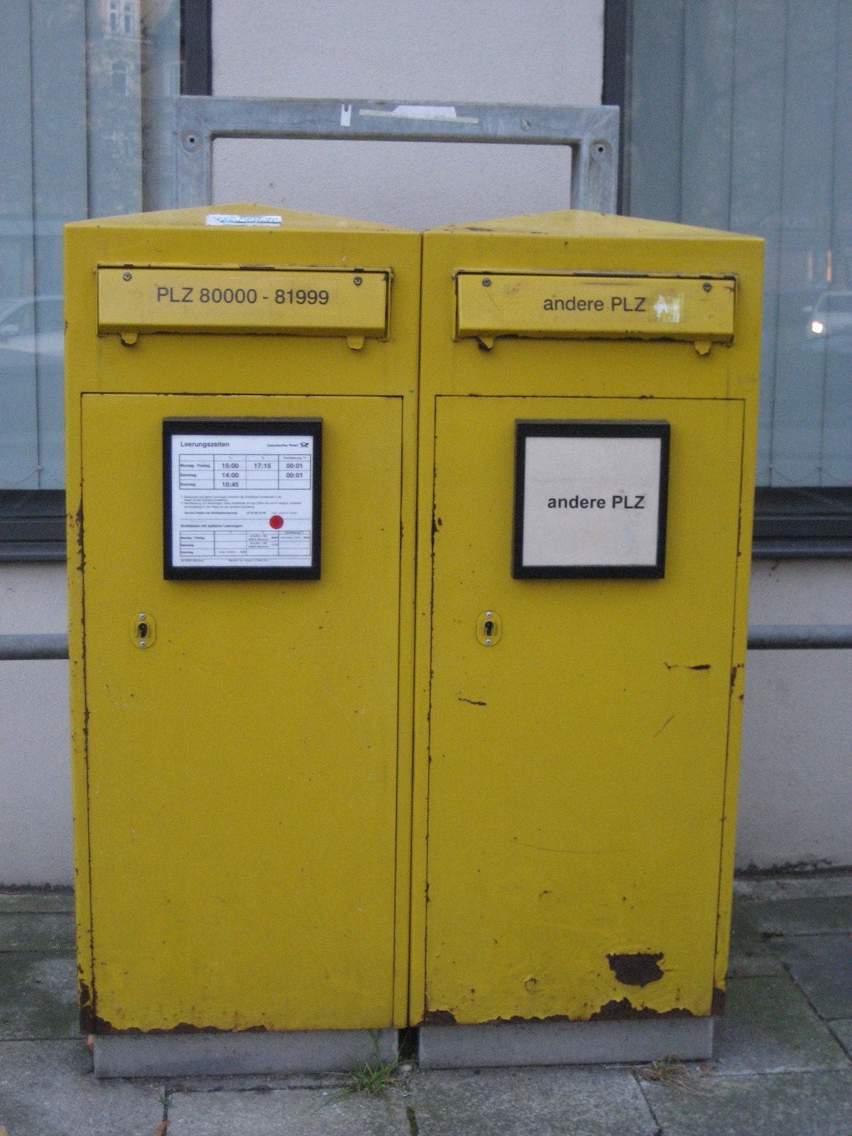 Großer Briefkasten der Deutschen Post AG